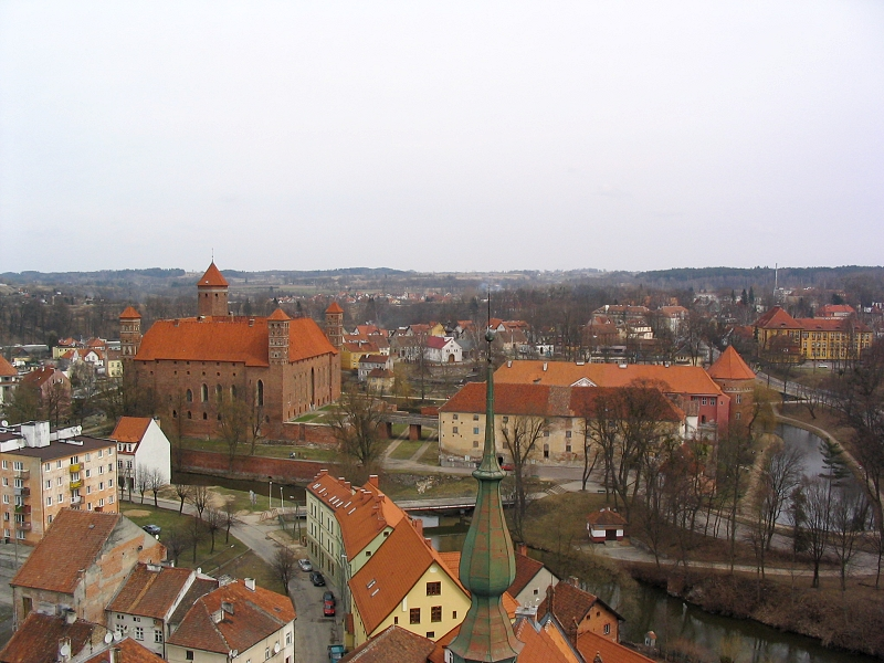 Blick vom Kirchturm von St. Peter und Paul auf das Schloss der Bischöfe von Ermland